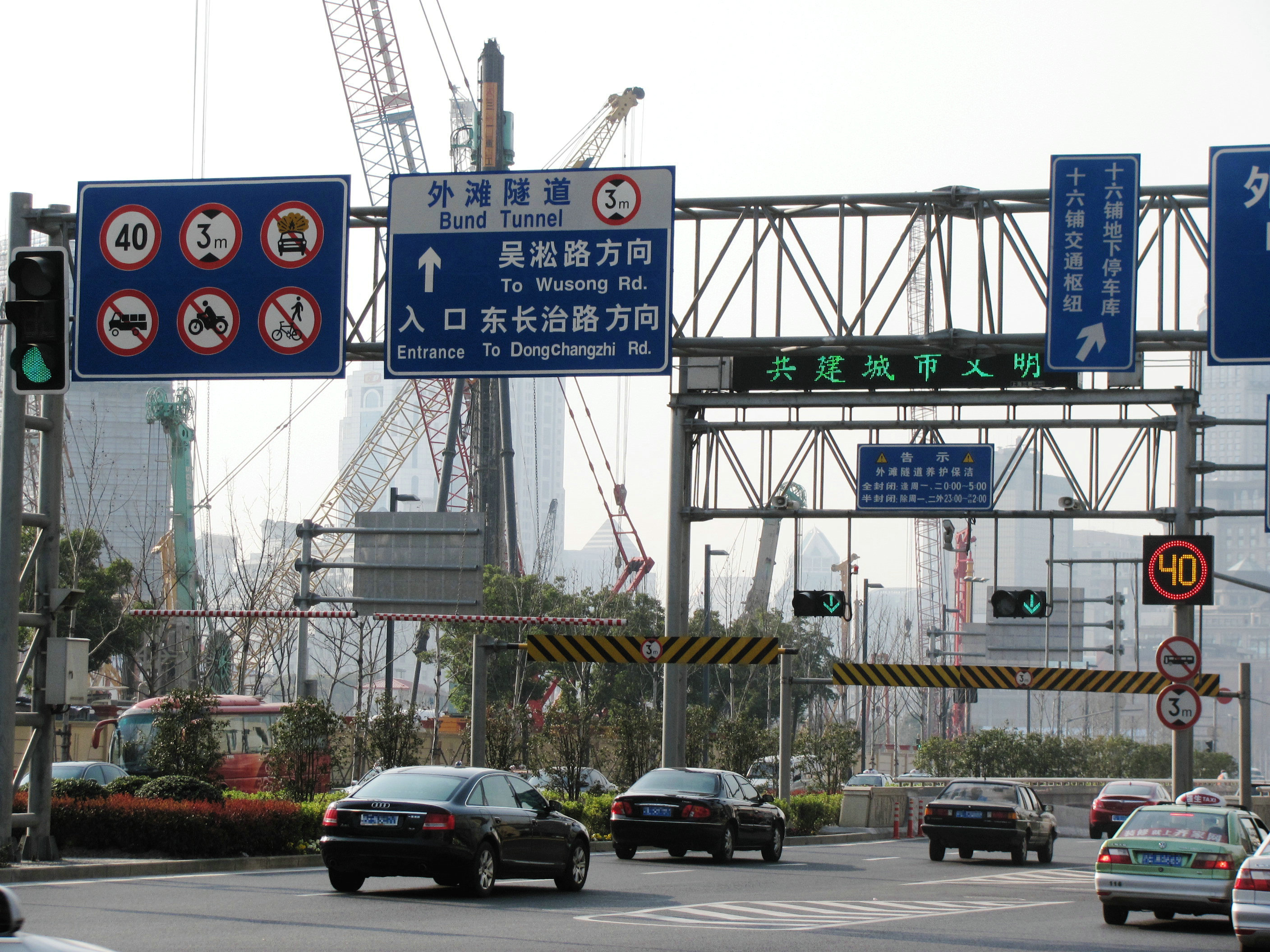 上海外滩隧道